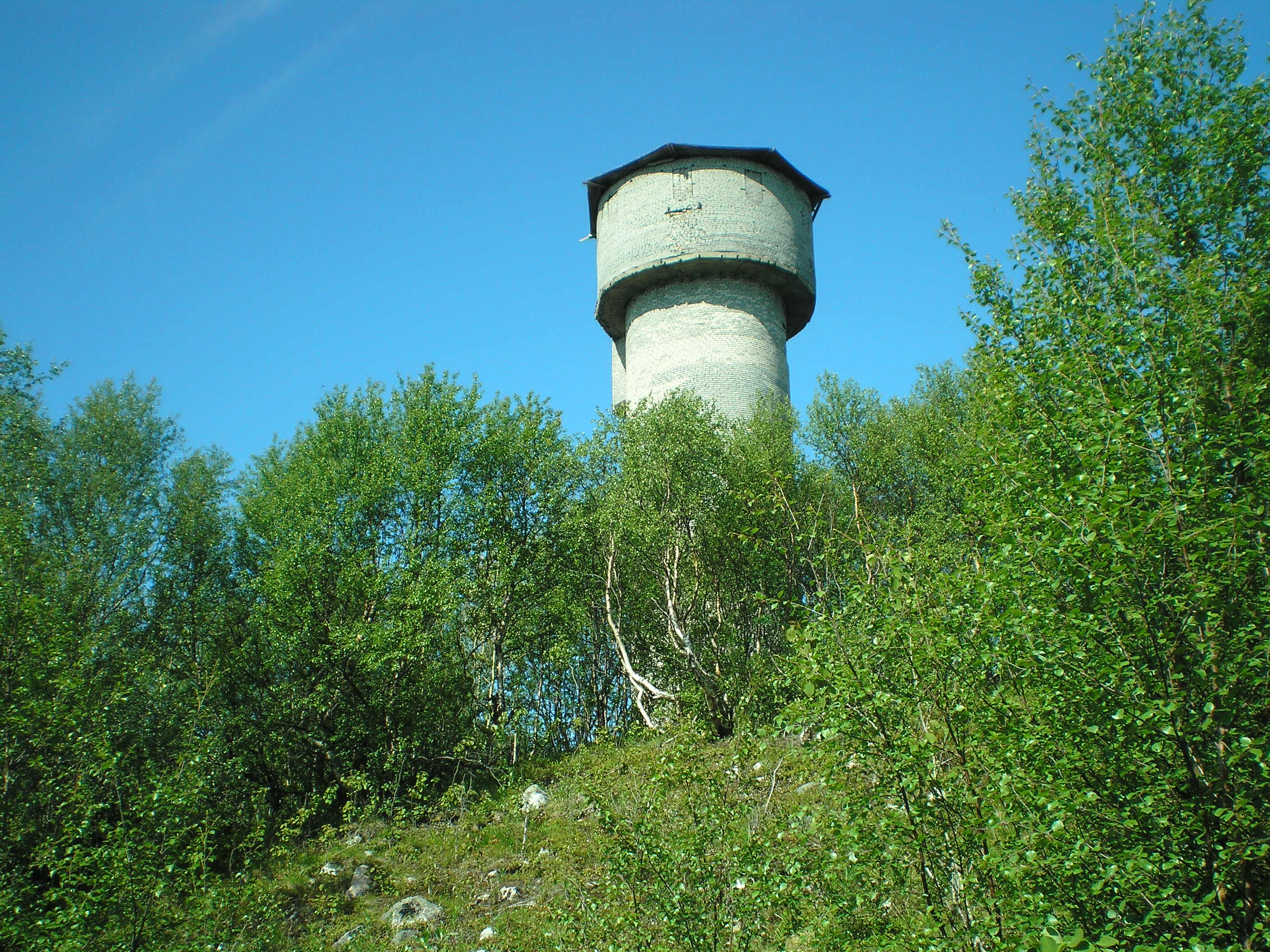 Водонапорная башня. 2010 г.